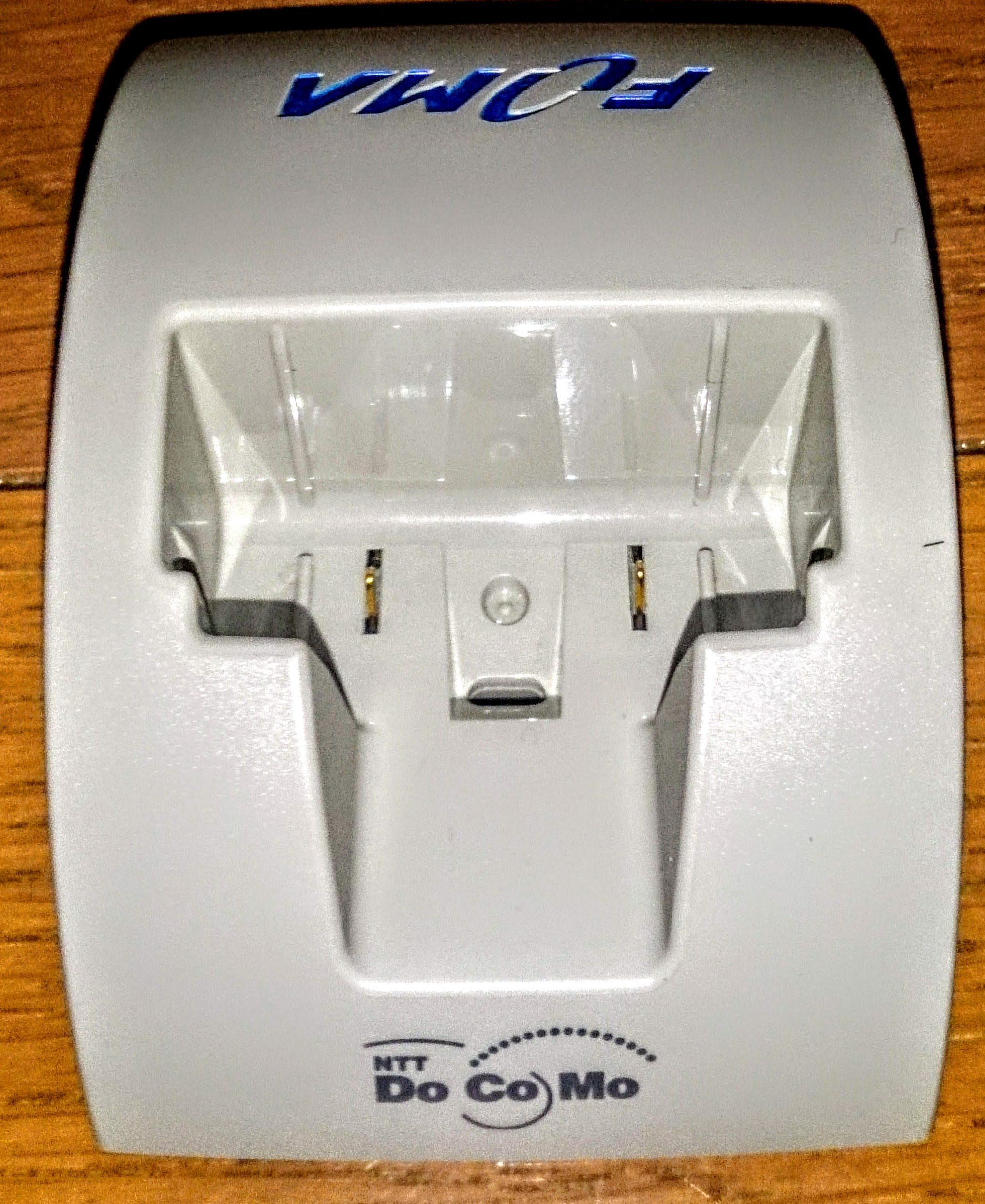 T2101V・卓上ホルダ・前面